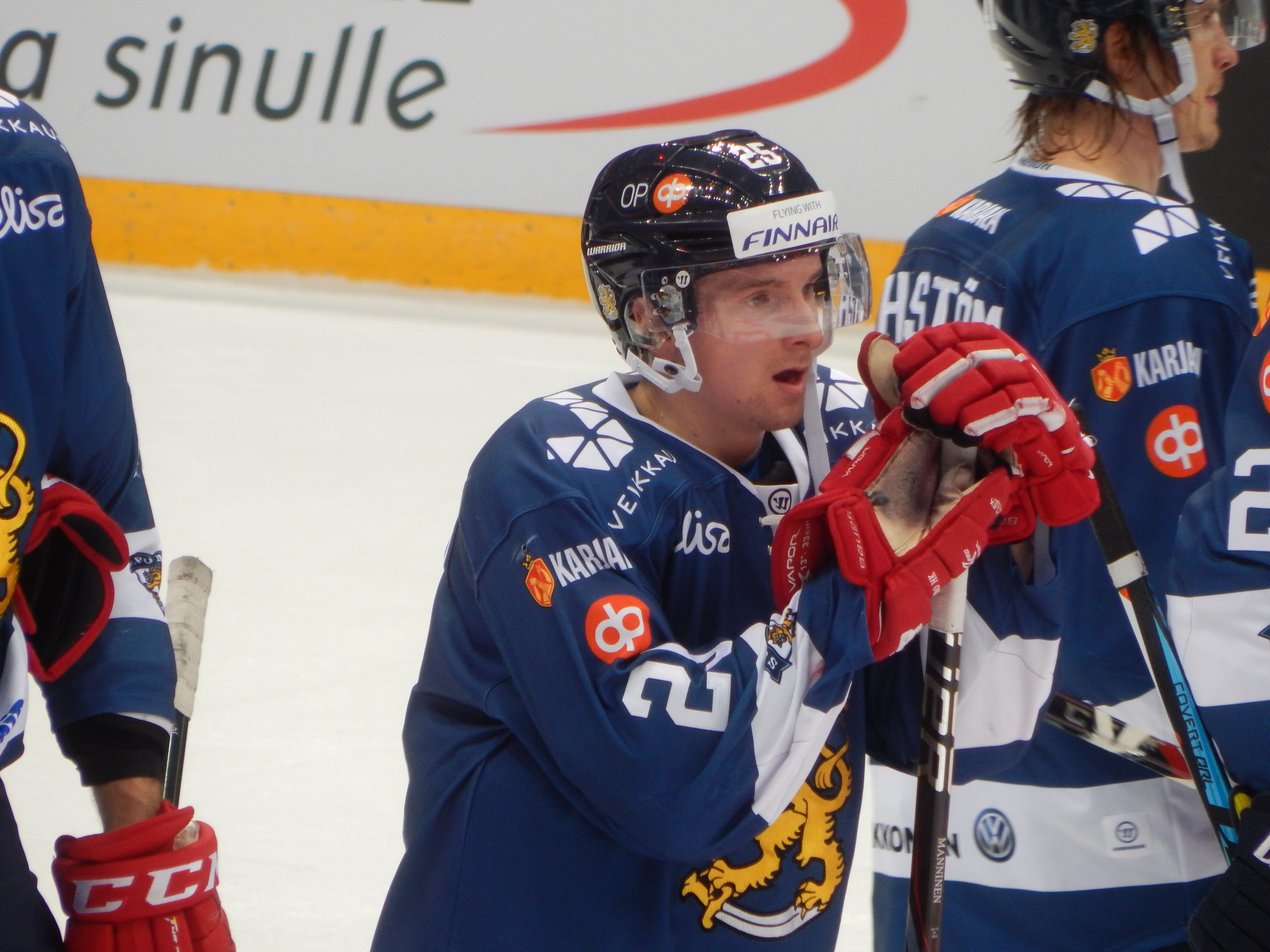 Кубок Первого Канала 2017, матч Финляндия - Южная Корея (15 декабря 2017) 25 MANNINEN,Sakari